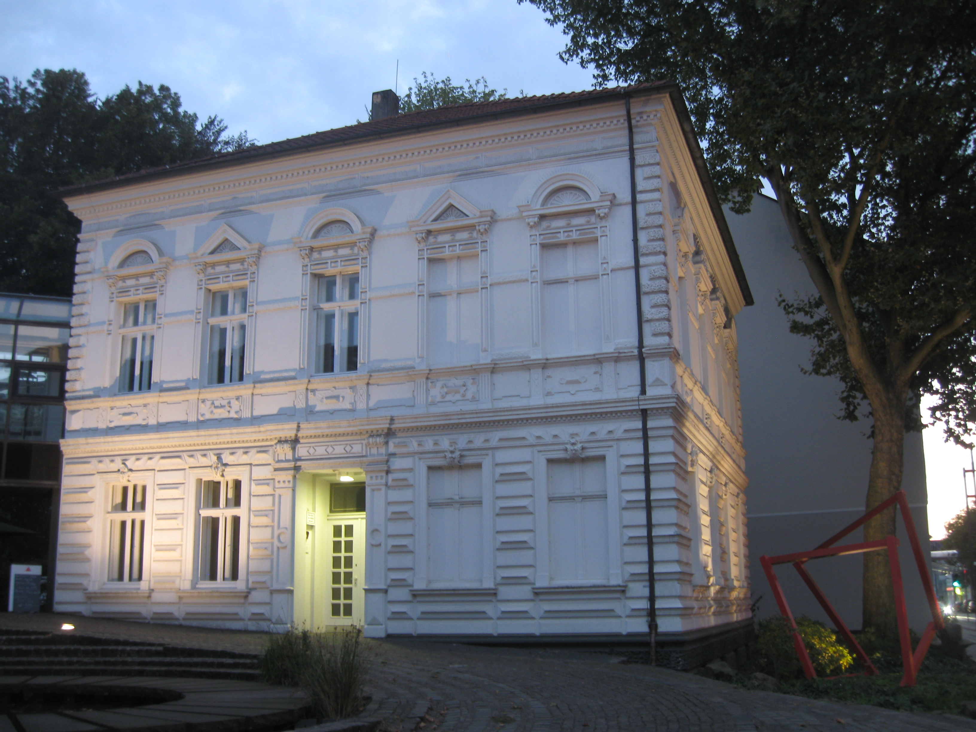 Kunstmuseum Gelsenkirchen (abends angestrahlt): 1893 errichtete Villa in der Horster Straße 7 in Gelsenkirchen-Buer, ab 1957 als Ausstellungsort genutzt, zum Städtischen Museum ausgebaut und 1982-1984 mit umfangreichen Anbauten versehen als Teil des Museumskomplexes, der 2008 in Kunstmuseum Gelsenkirchen umbenannt wurde. Der Eintritt ist seit jeher kostenlos.